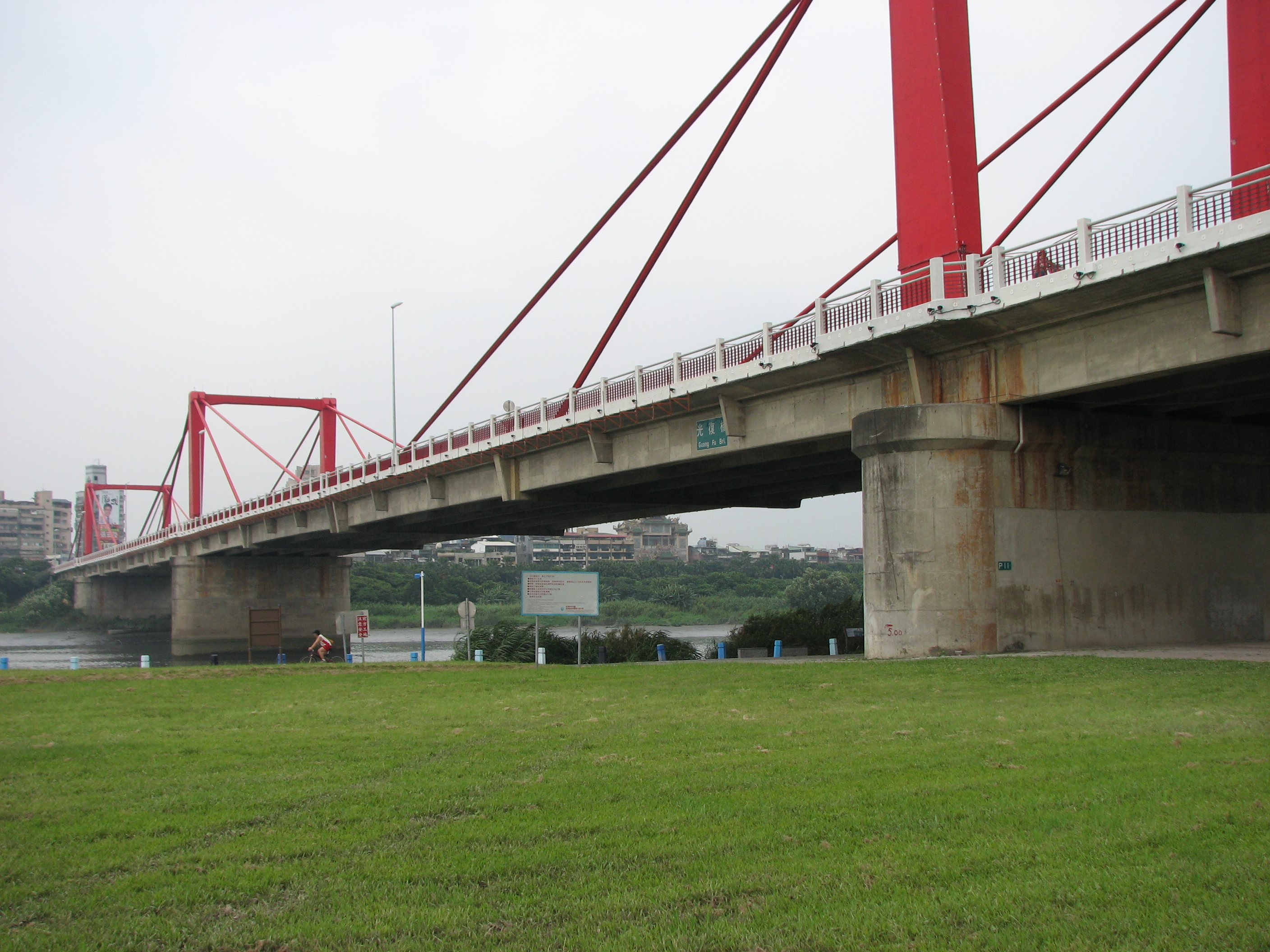 台北萬華板橋之間橫跨新店溪的光復橋